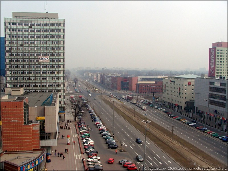 Lodz - ul. Piłsudskiego